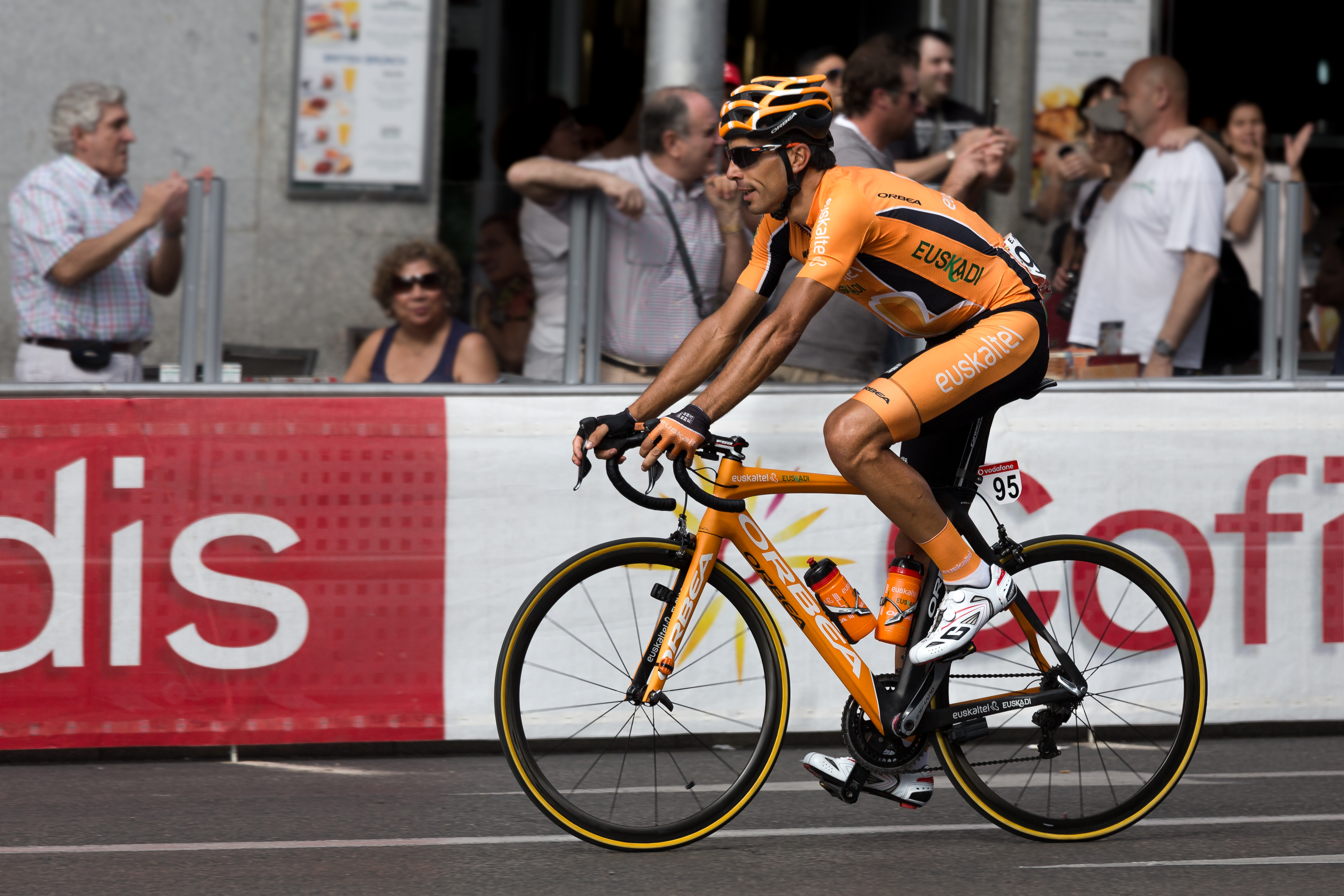 Egoi Martínez (#95/Euskaltel Euskadi). Última etapa de la Vuelta a España 2013. Madrid.